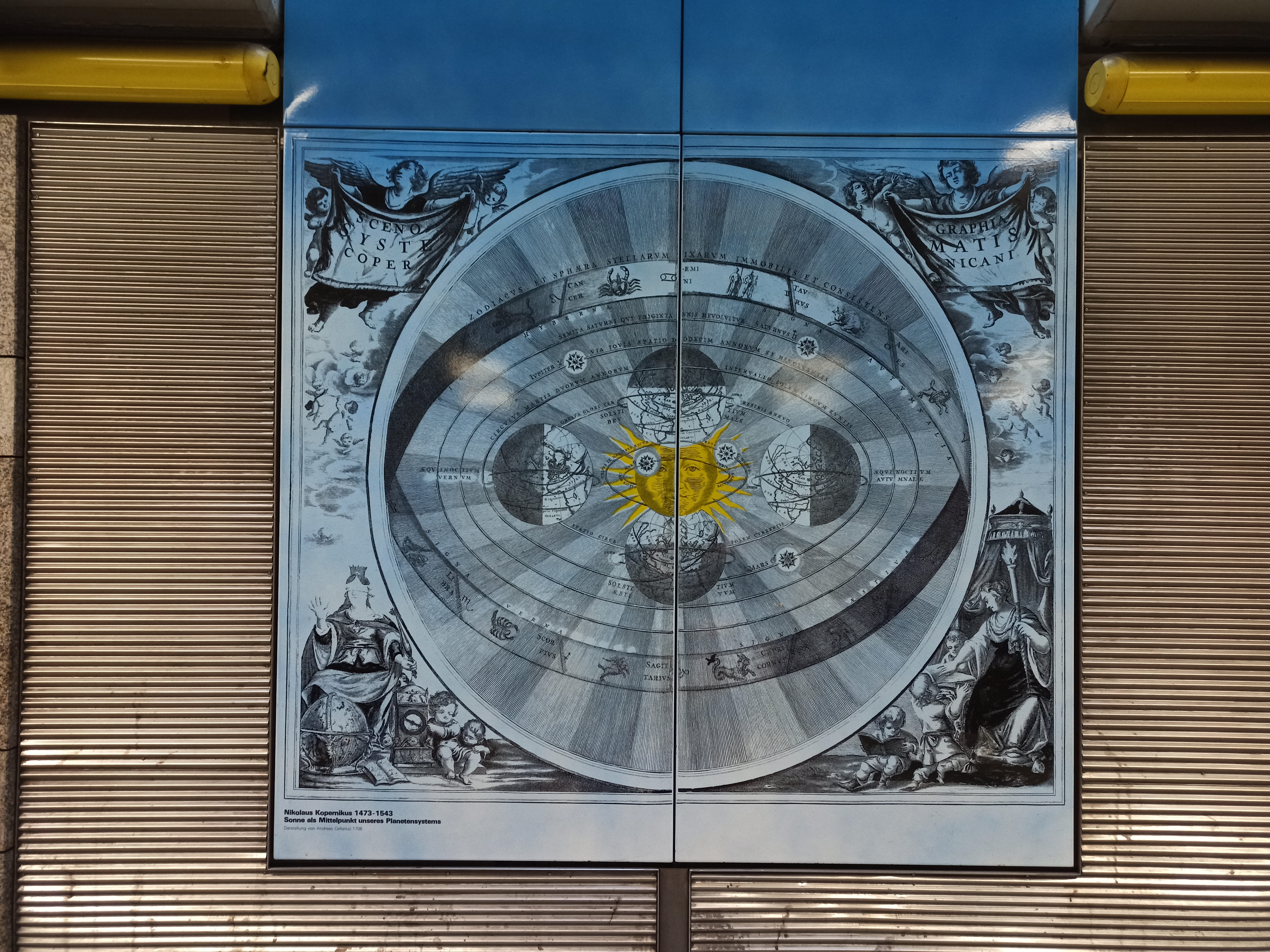 Stadtbahn Hannover, U-Bahnhof Kopernikusstraße, Grafik des heliozentrischen Weltbildes nach Nikolaus Kopernikus (1473-1543) aus dem historischen Sternatlas Harmonia Macrocosmica, Taken on 28 June 2020